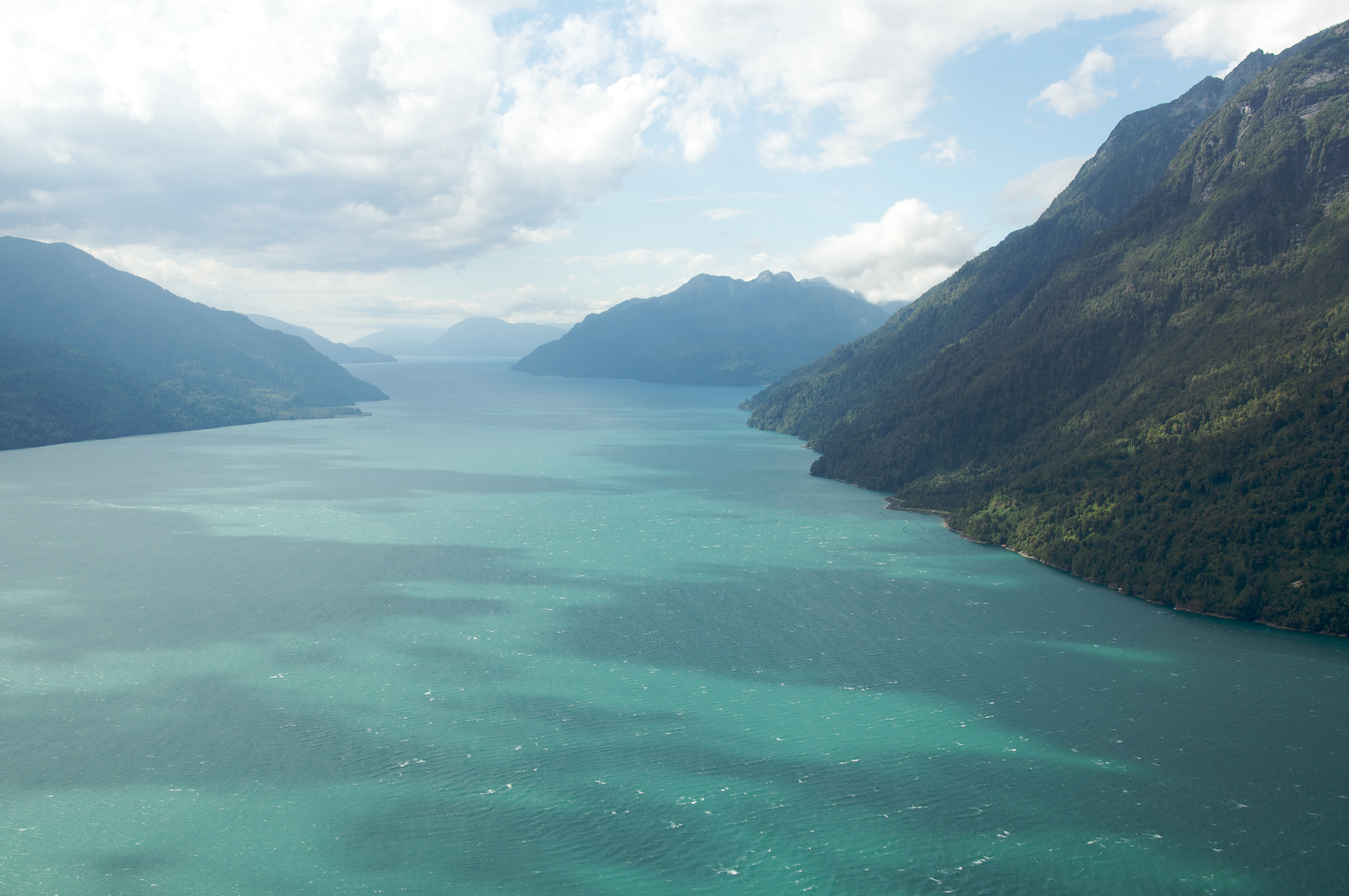 Comau Fjord, Chile.